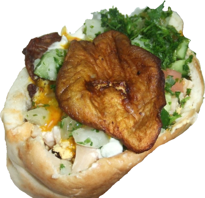 sabih